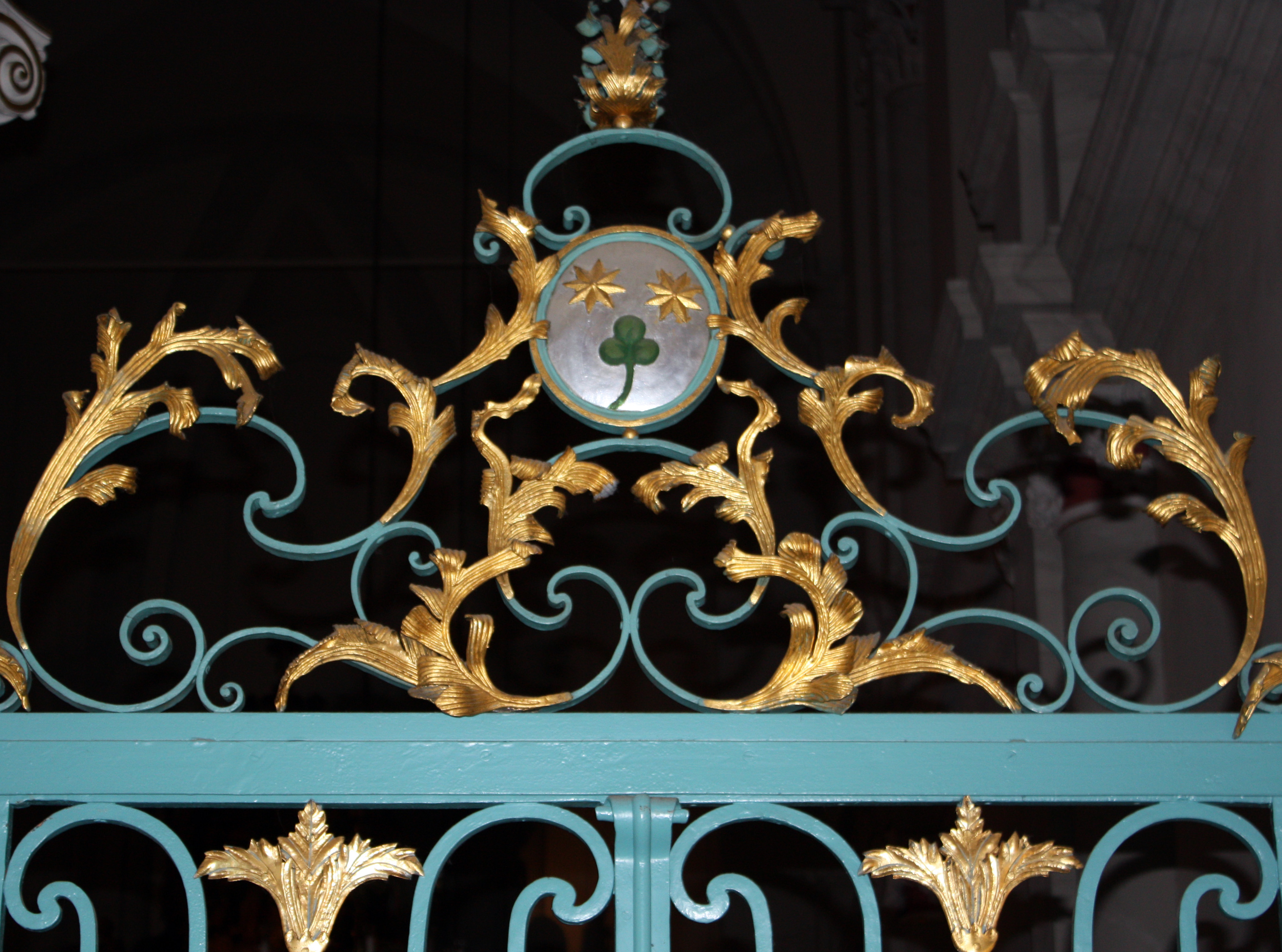 Köln, St. Maria in der Kupfergasse. Innenraum, Wappen von Groote